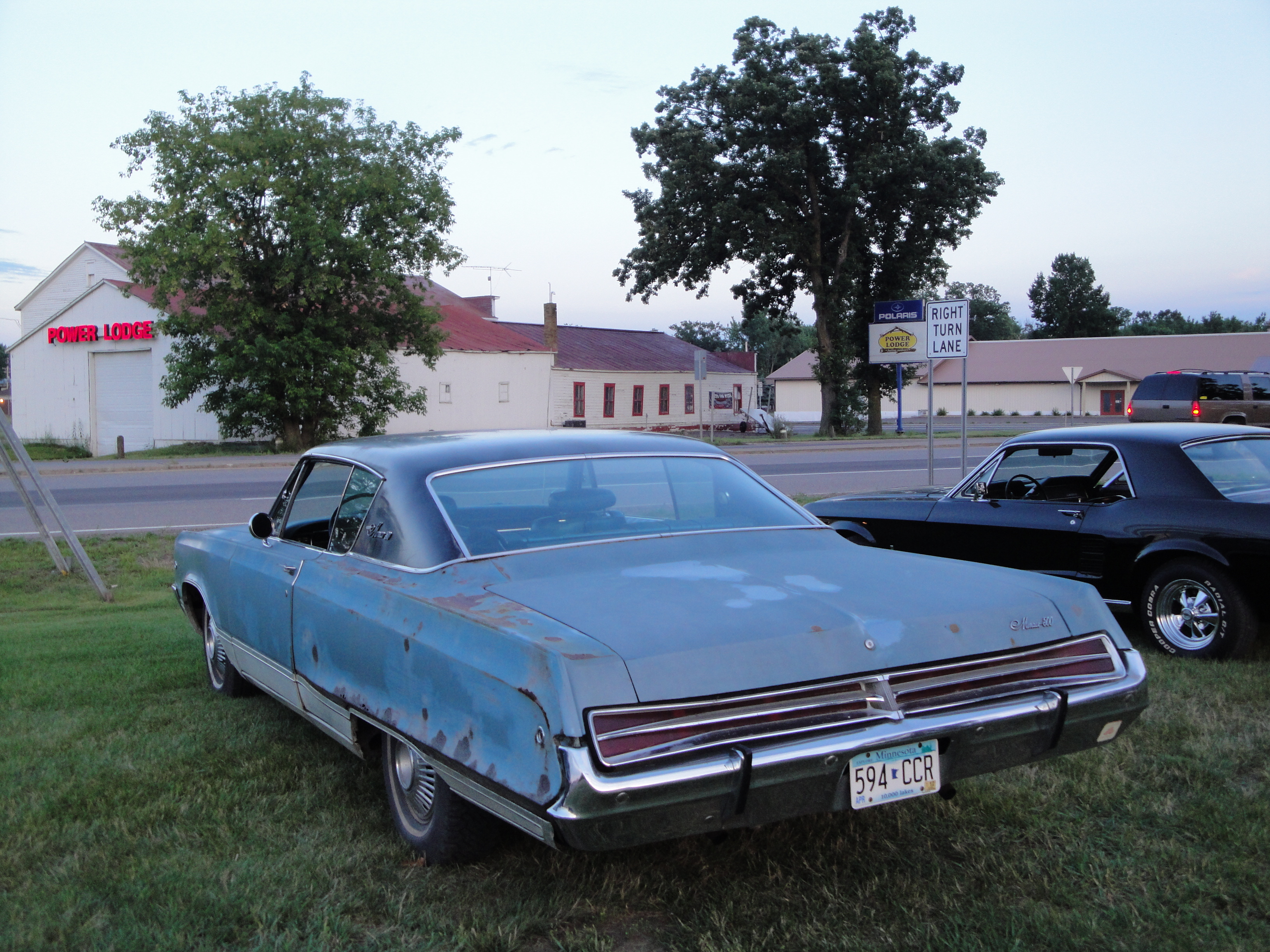 68 Dodge Monaco 500